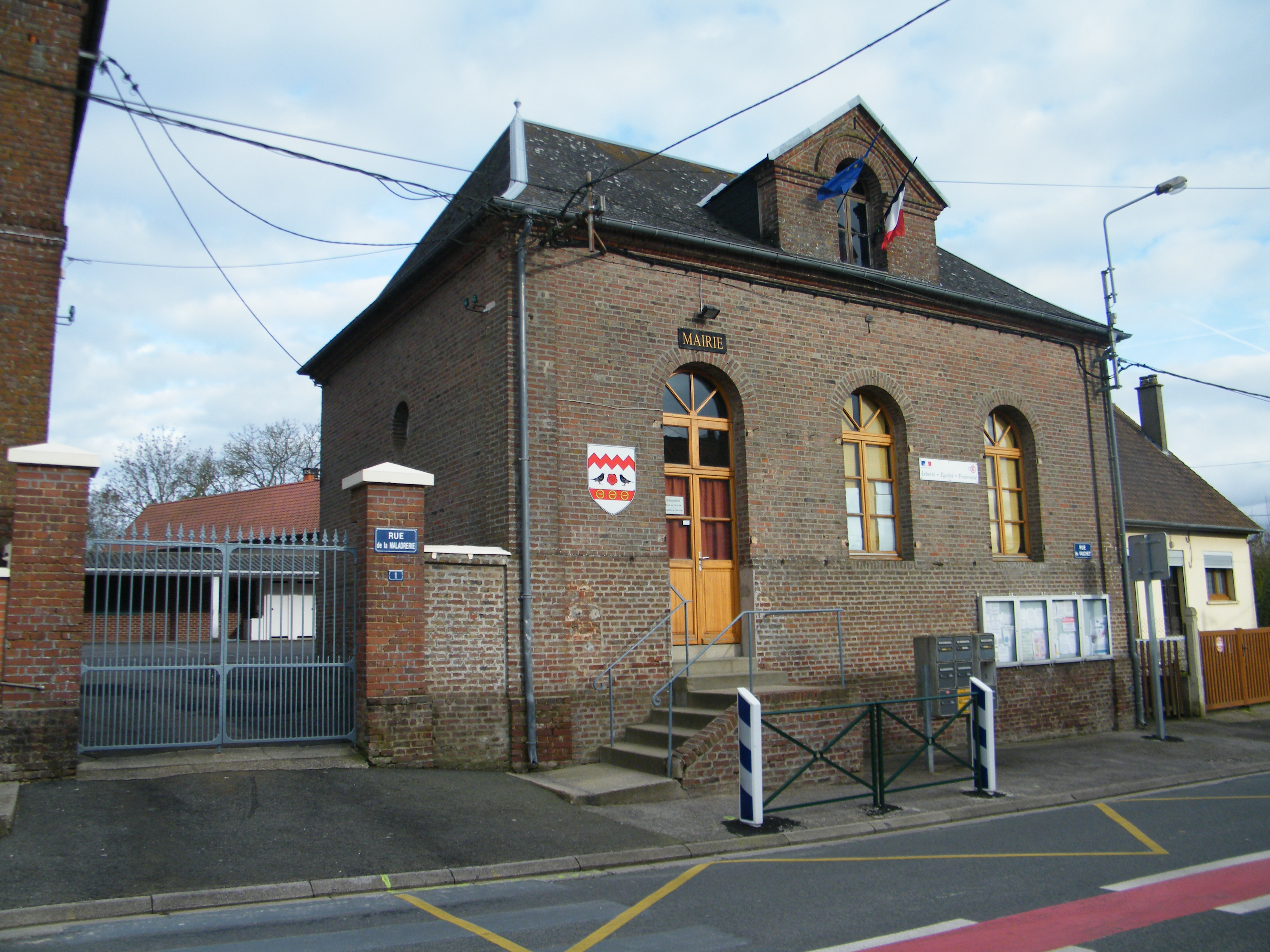 Mairie